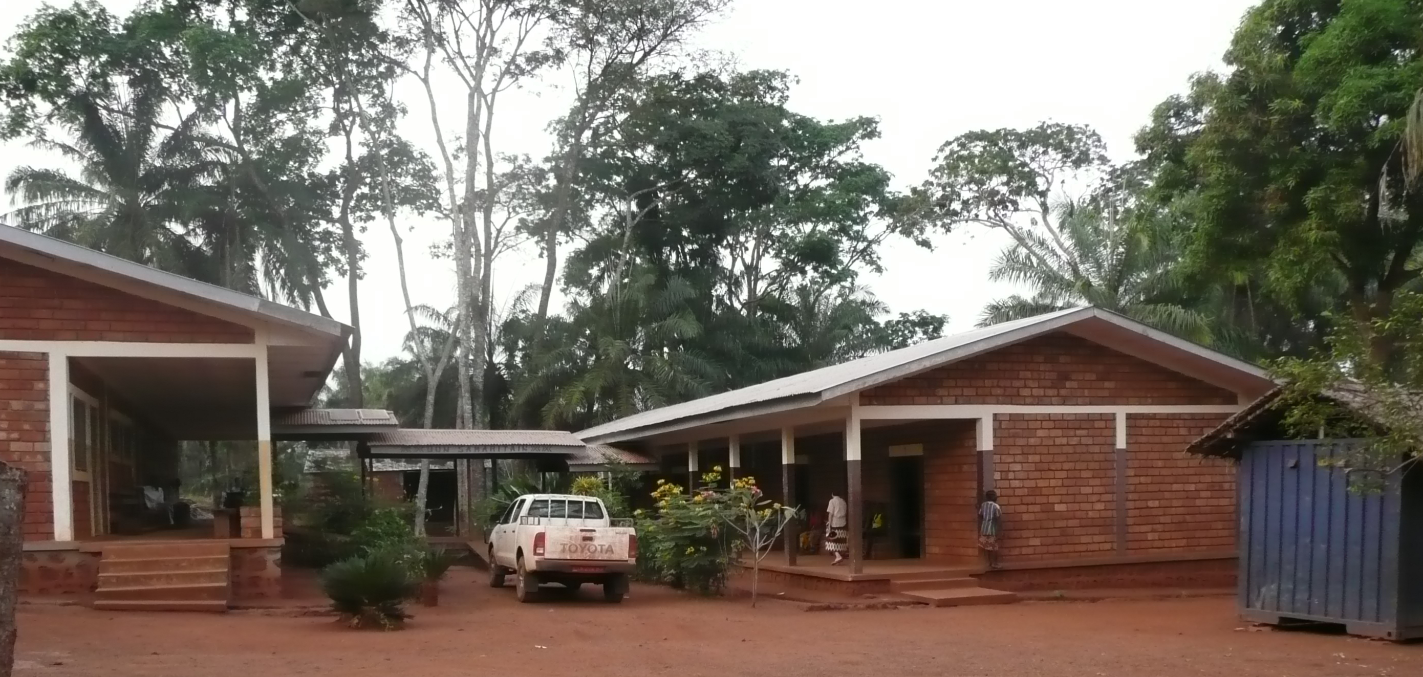 Centro de atención a enfermos de sida en fase terminal «Buen Samaritano», promovido por la diócesis de Bangassou (República Centroafricana)